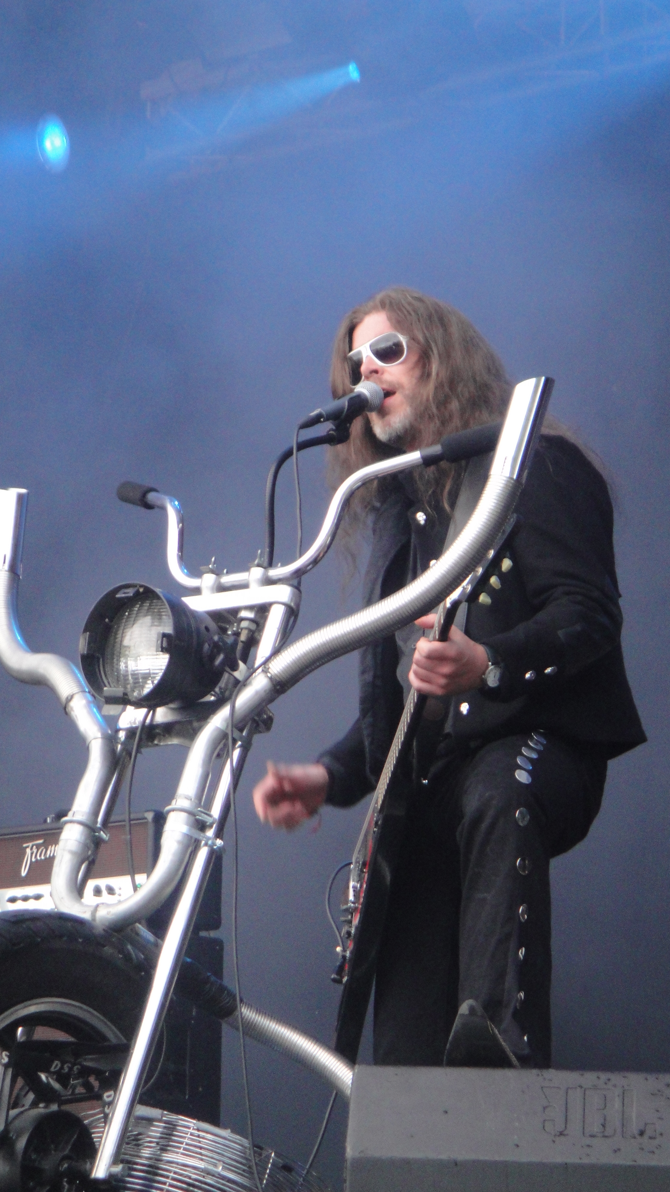 Lars Lønning under en konsert med Black Debbath på Pstereofestivalen i Trondheim, august 2009.